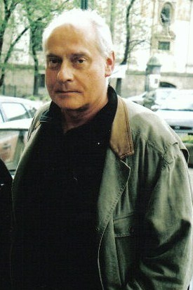 Tadeusz Huk.